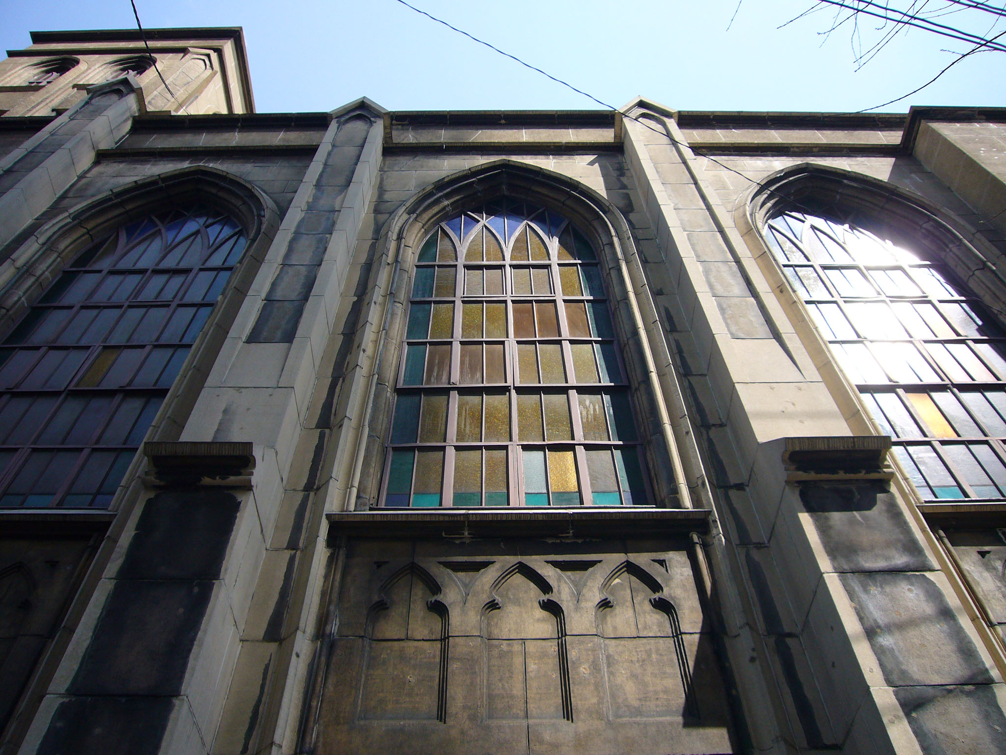 UCCJ Naniwa Church in Osaka, Japan